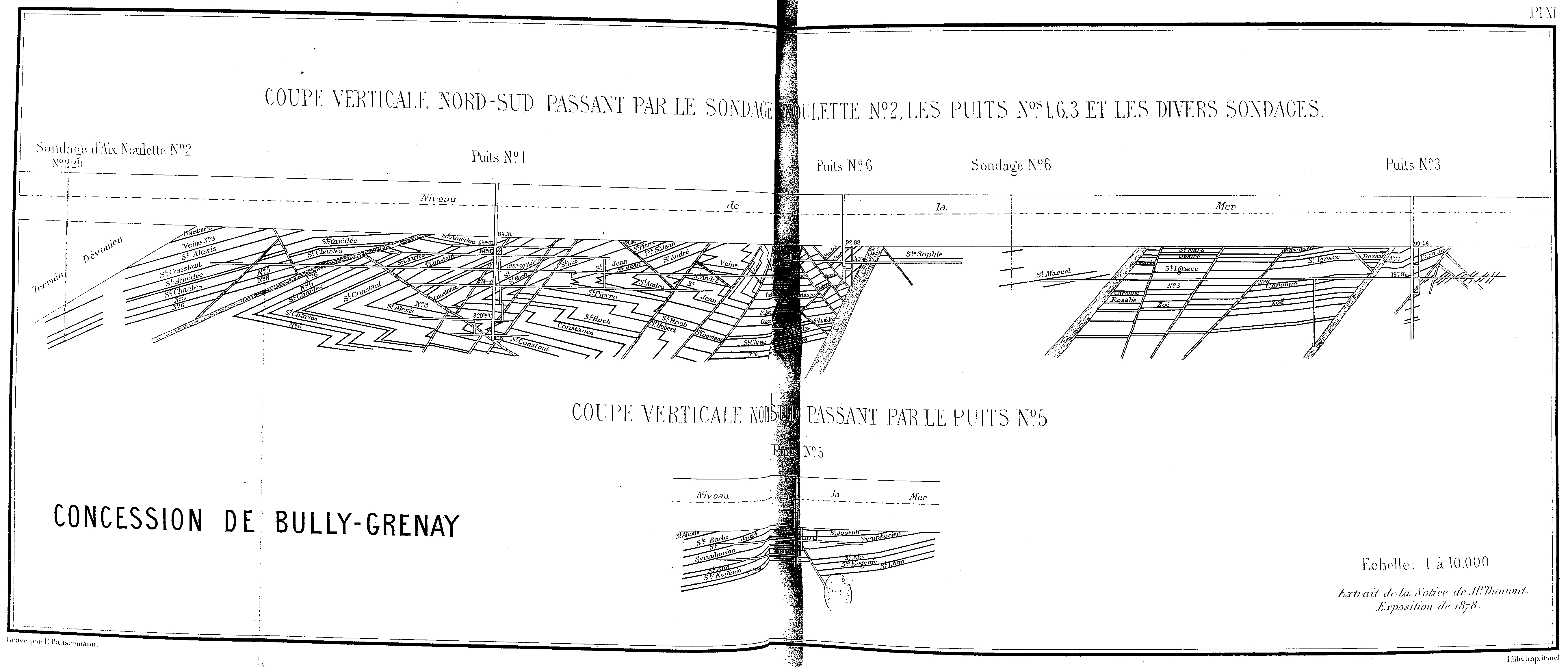 Compagnie des mines de Béthune.